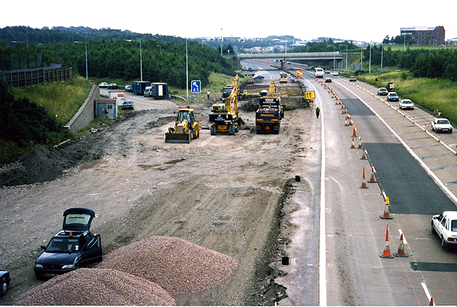 Rebuilding M54